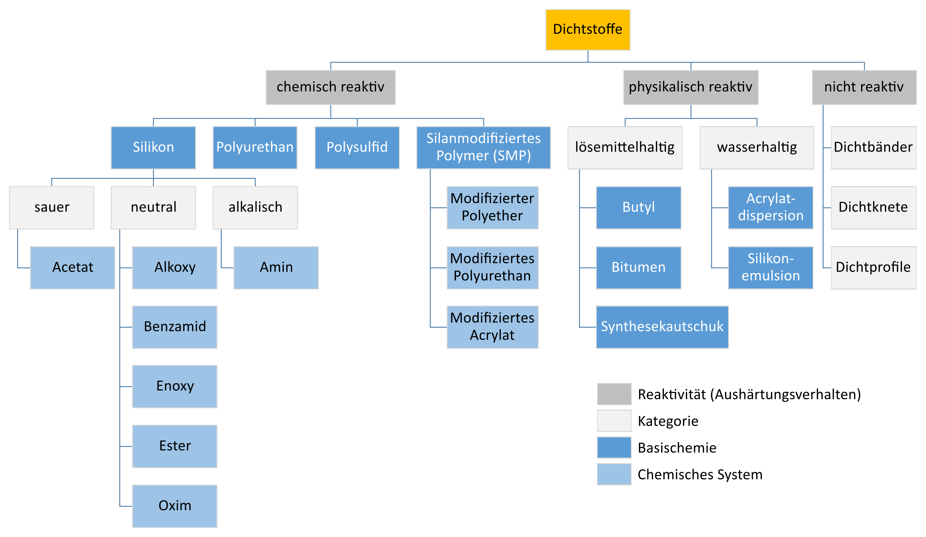 Einteilung der wichtigsten Dichtstoffe nach Reaktivität (Aushärtungsverhalten) und Basischemie